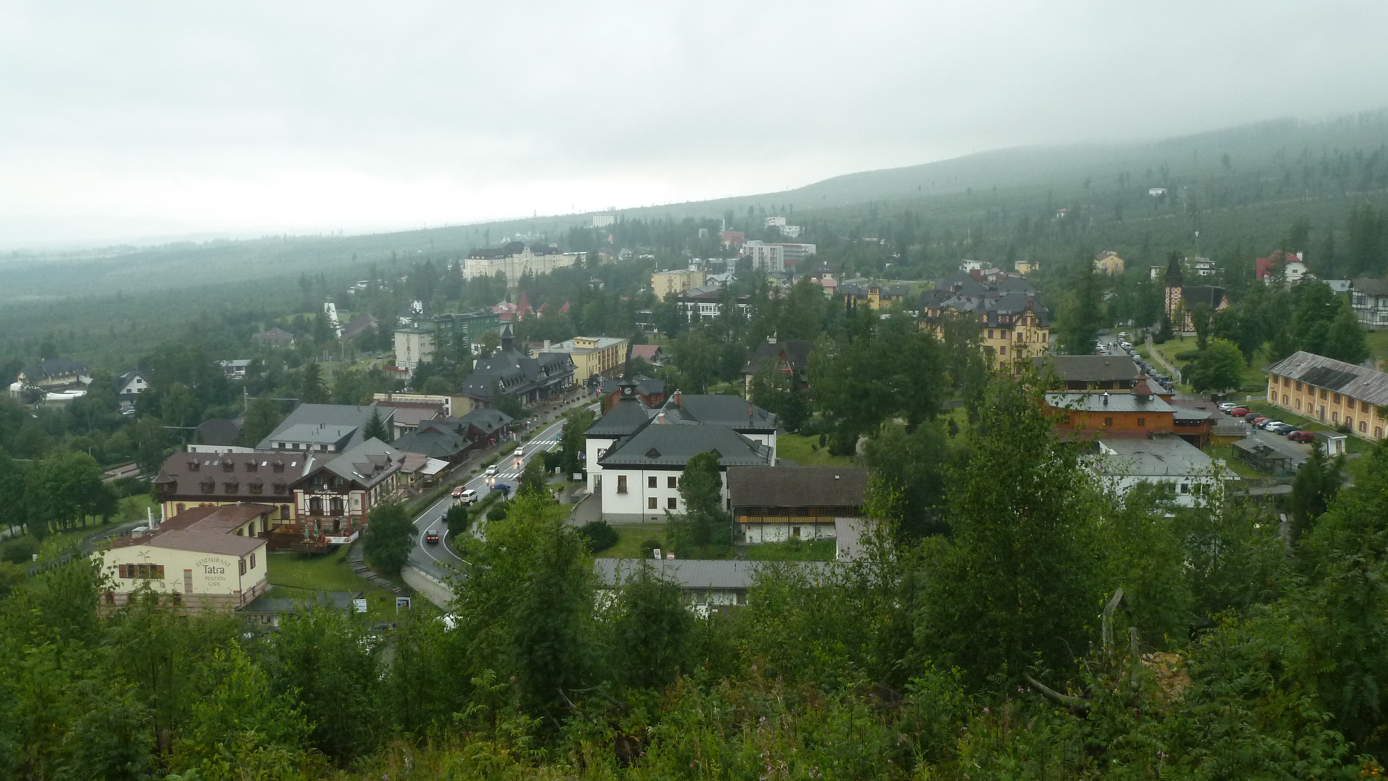 Pohľad na Starý Smokovec